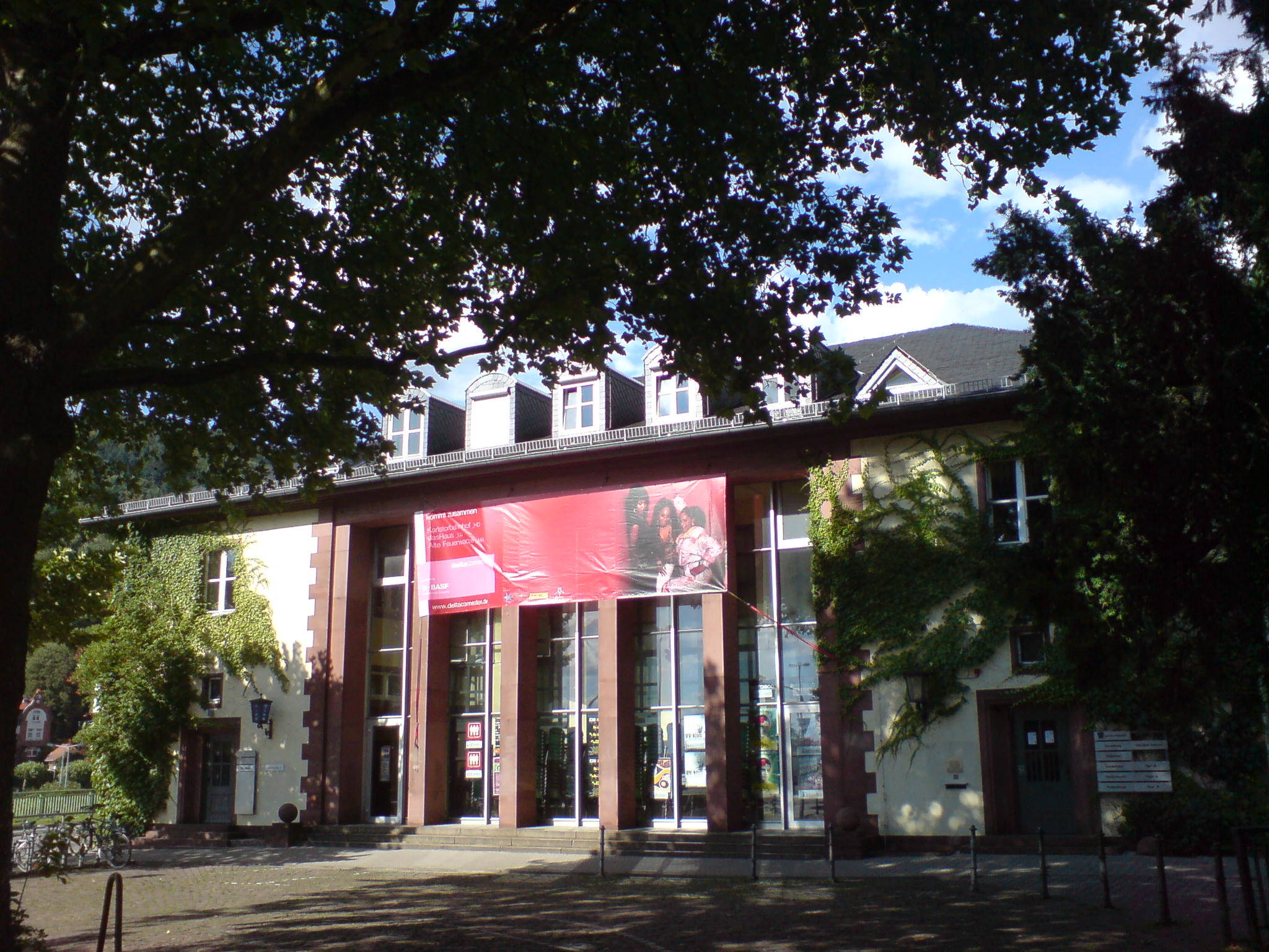 Karlstorbahnhof in Heidelberg/Germany